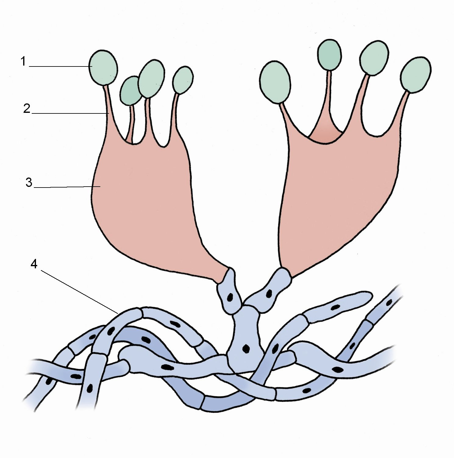 Basidie